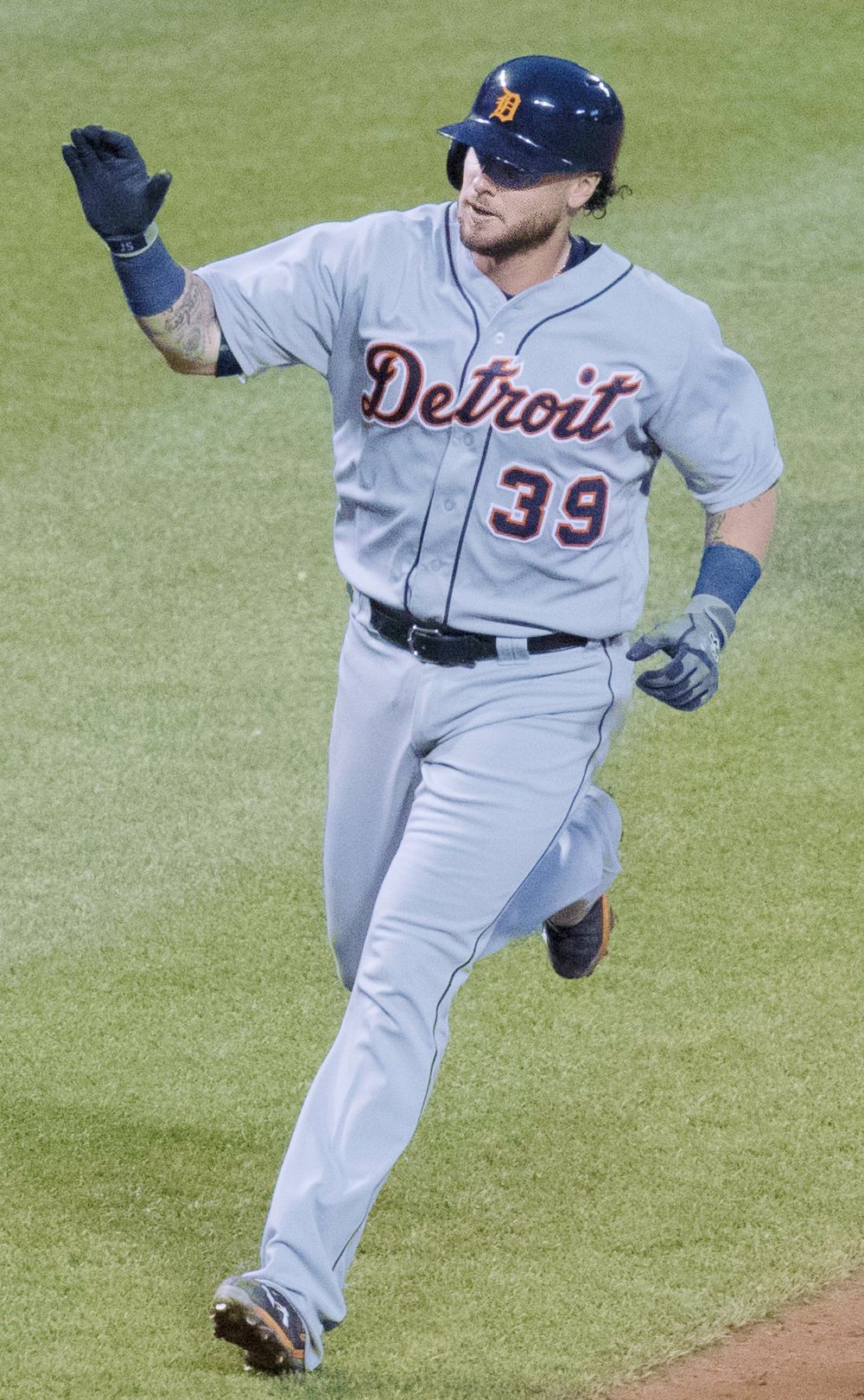 Jarrod Saltalamacchia